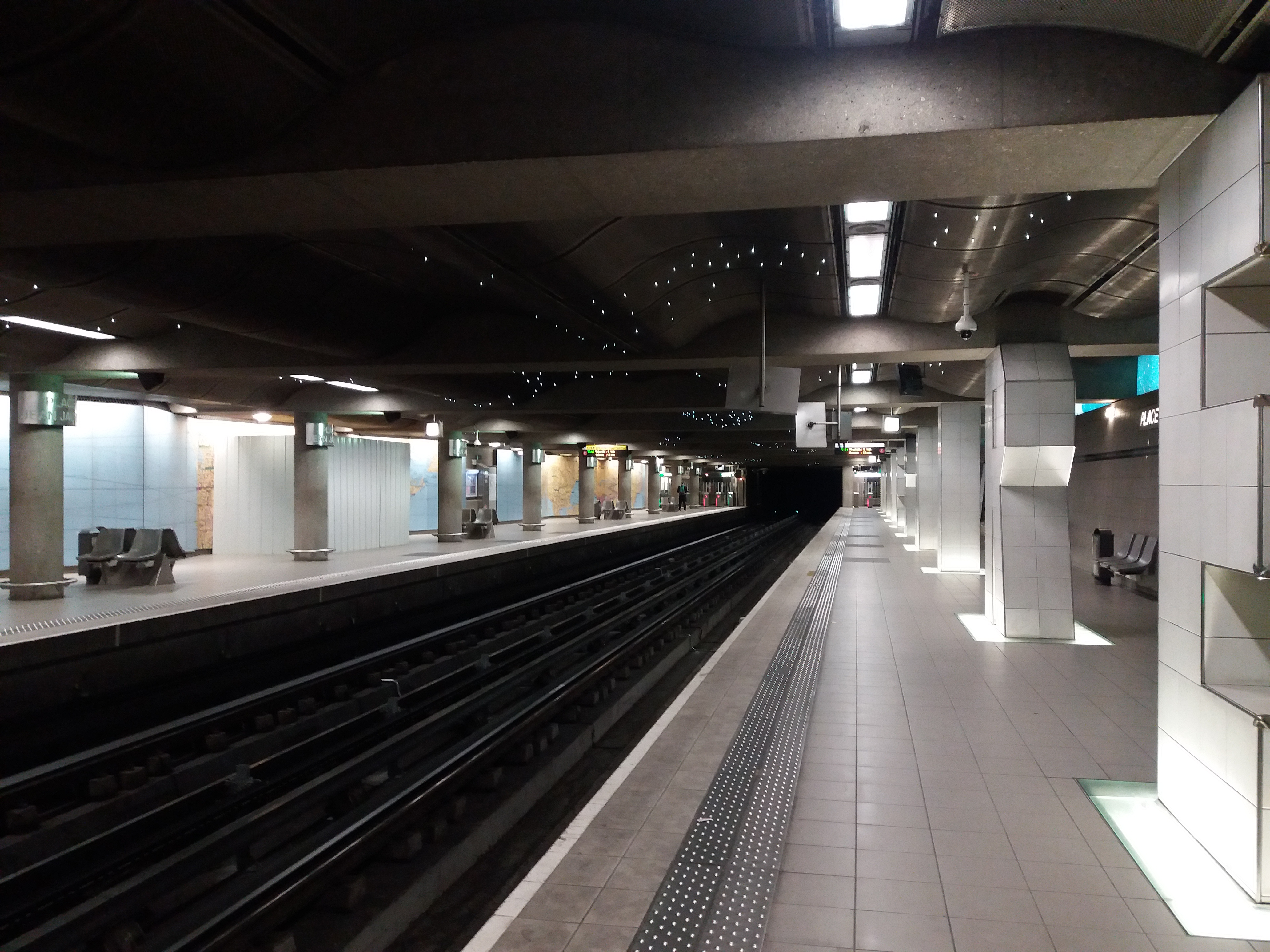 Direction nord, prise du quai direction Oullins.